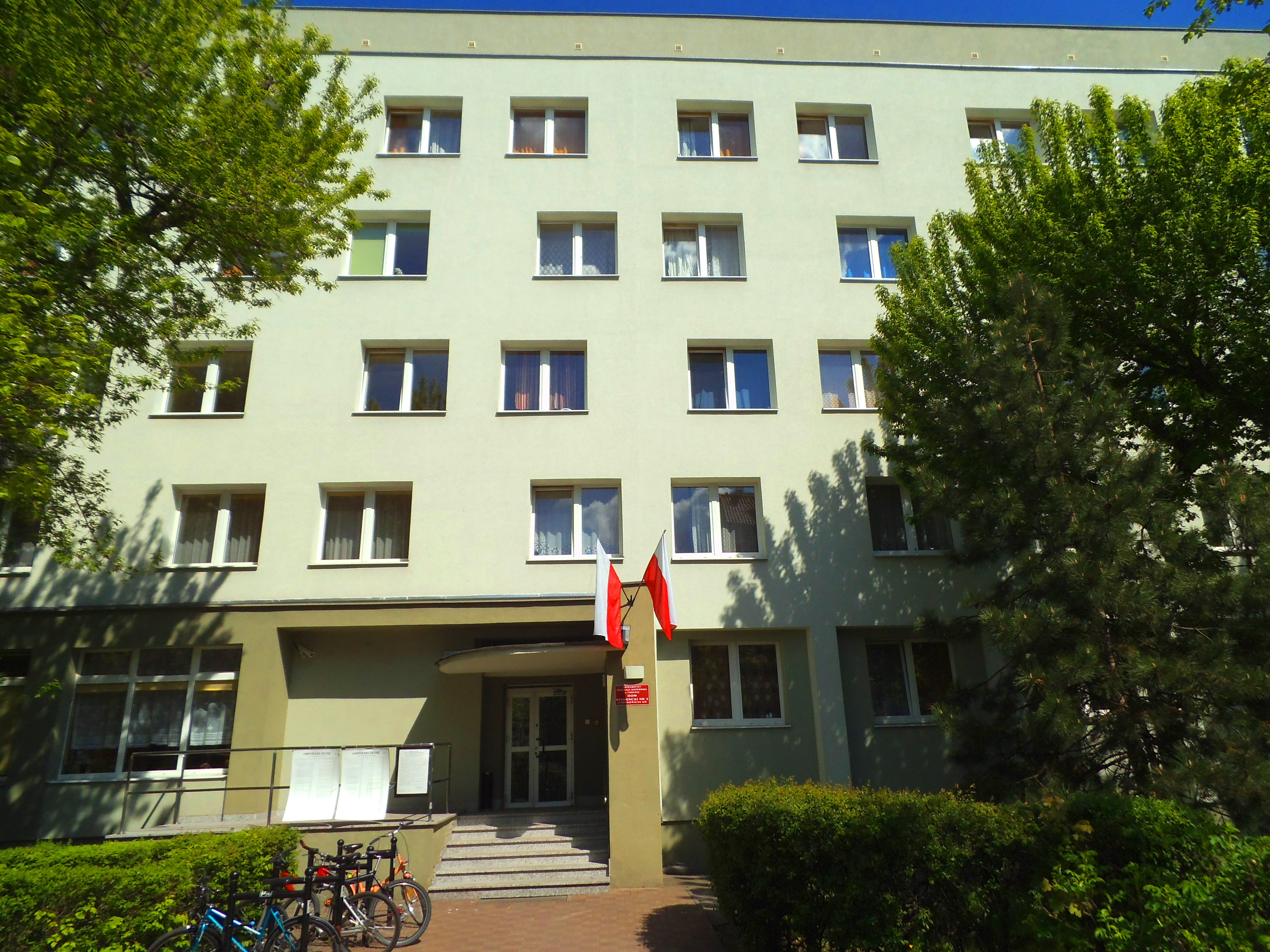 Dom Studencki UMK nr 2 w Toruniu